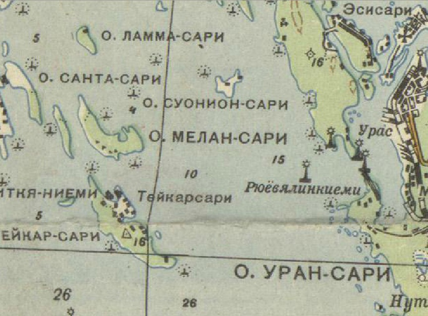 Острова Выборгского залива на оперативной карте 1941 г.